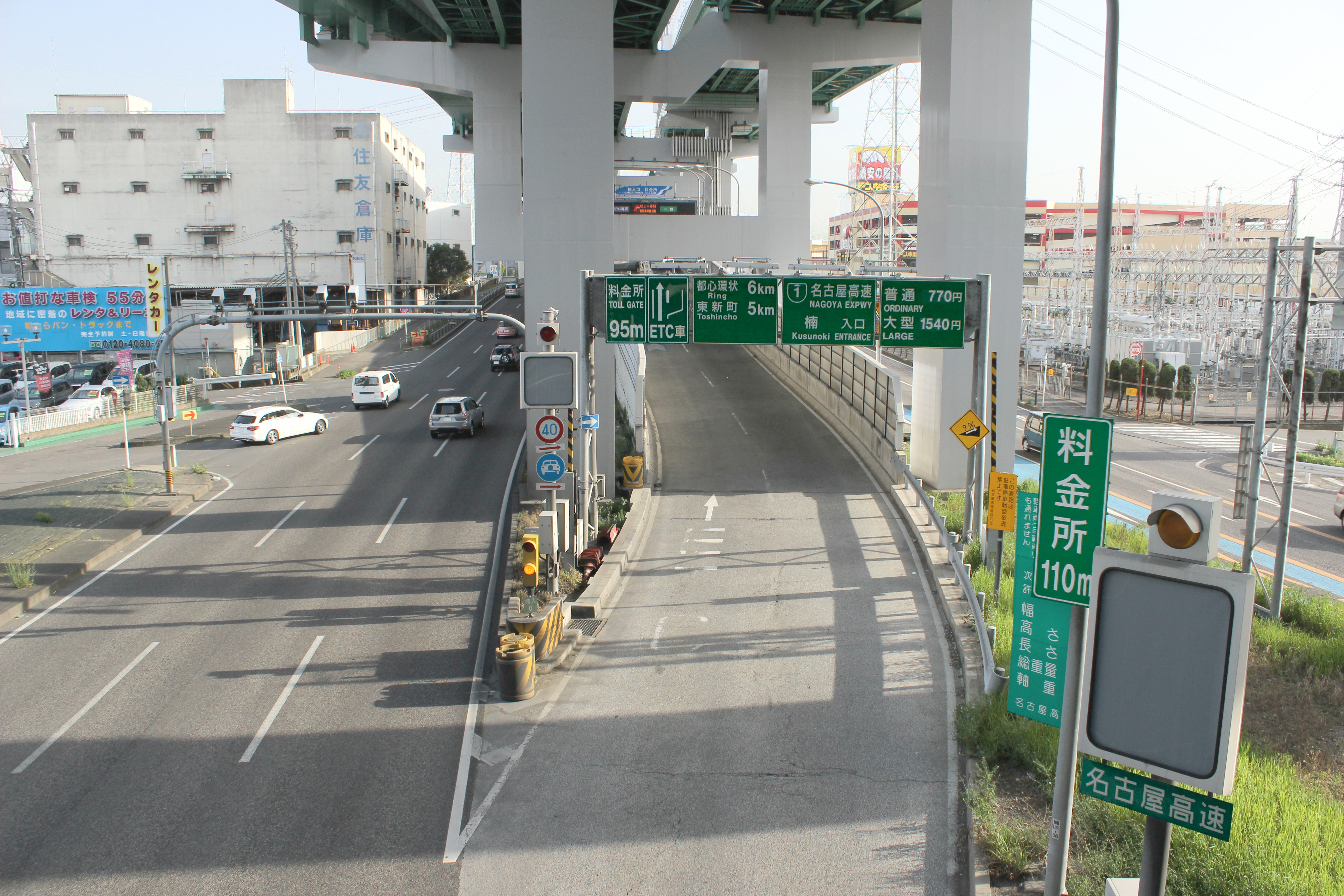 名古屋高速 楠入口